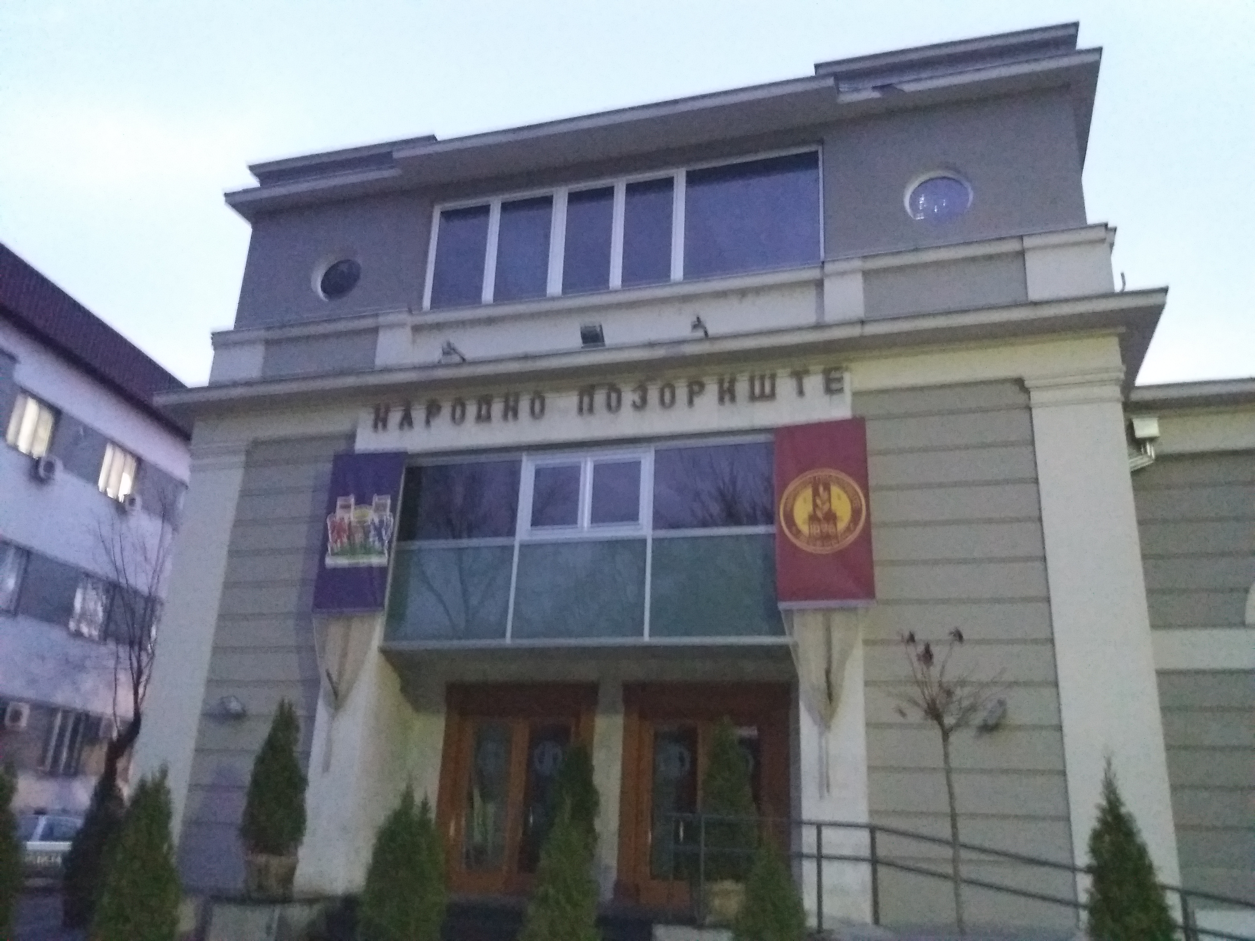 Srpski (latinica): Narodno pozorište Leskovac